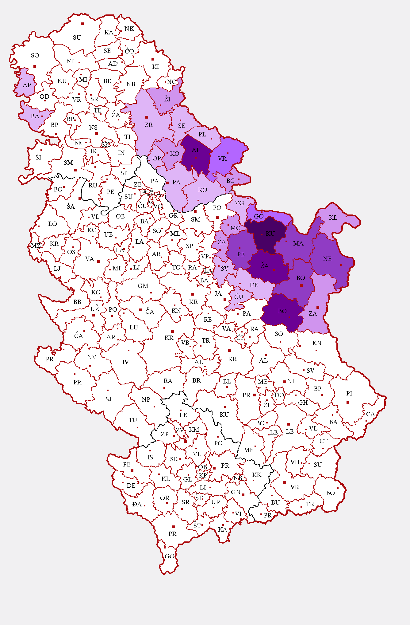 conform datelor recensământului din 2002, vezi Evoluţia demografică a românilor din Serbia/according to census-data in 2002, see Evoluţia demografică a românilor din SerbiaNote: The 2002 Serbian census listed Romanian and Vlach as two separate languages. See: Official results of 2002 census in Serbia and Language spoken by the Vlachs of Serbia. 1-5% 5-10% 10-15% 15-25% 25-35% over 35%